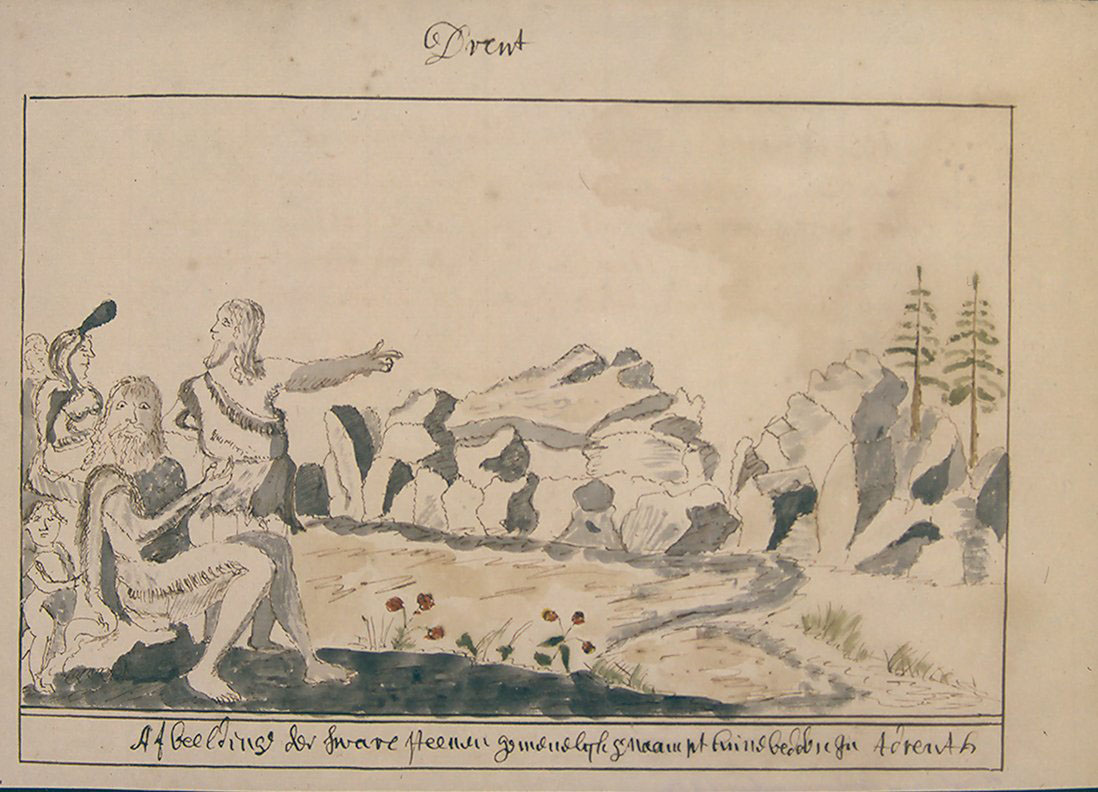 Beschrijving van het Landschap Drente, met Afbeeldingen der voornaamste Huizen